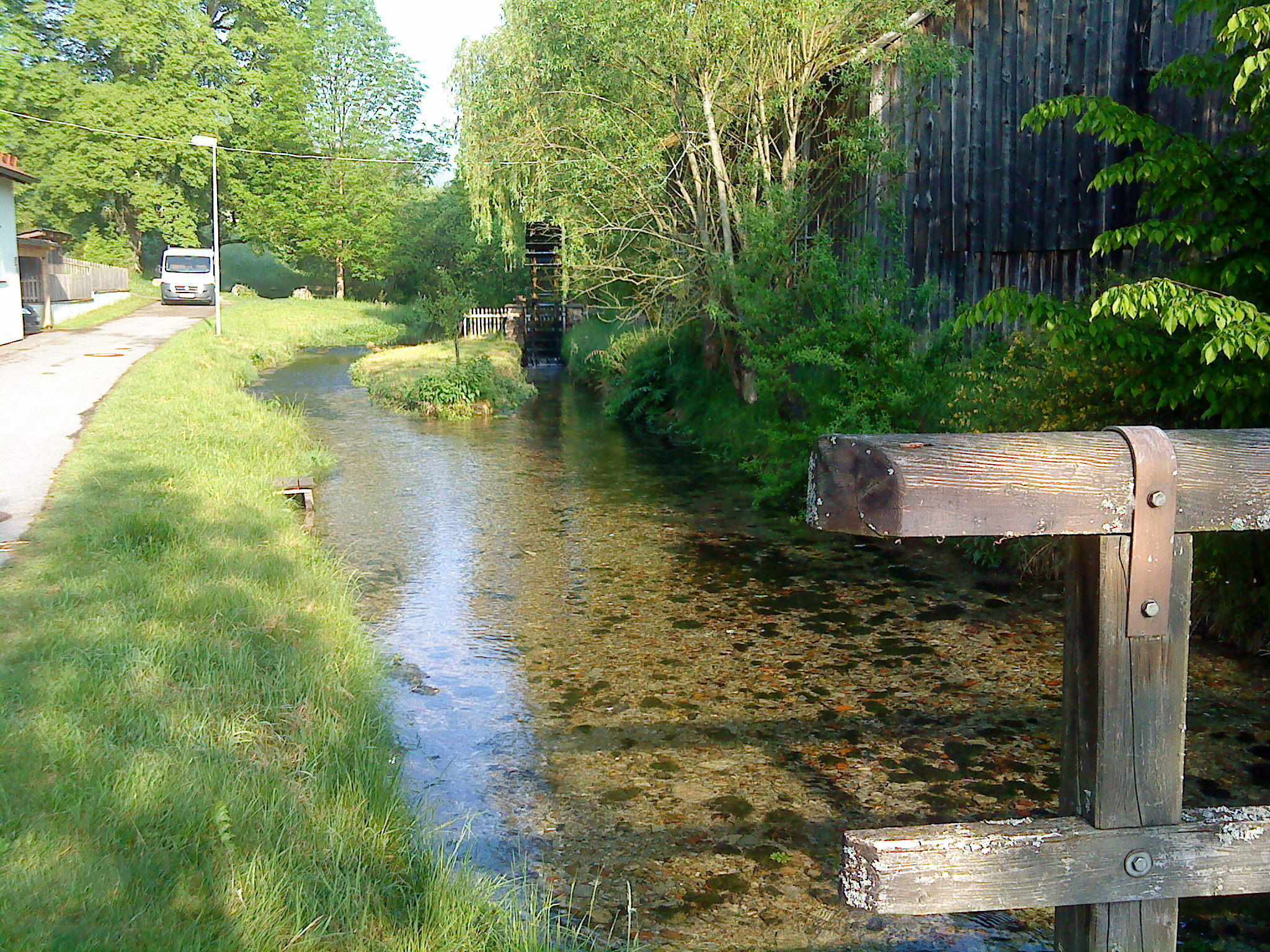 Die Schambach kurz nach ihrer Quelle in Schamhaupten